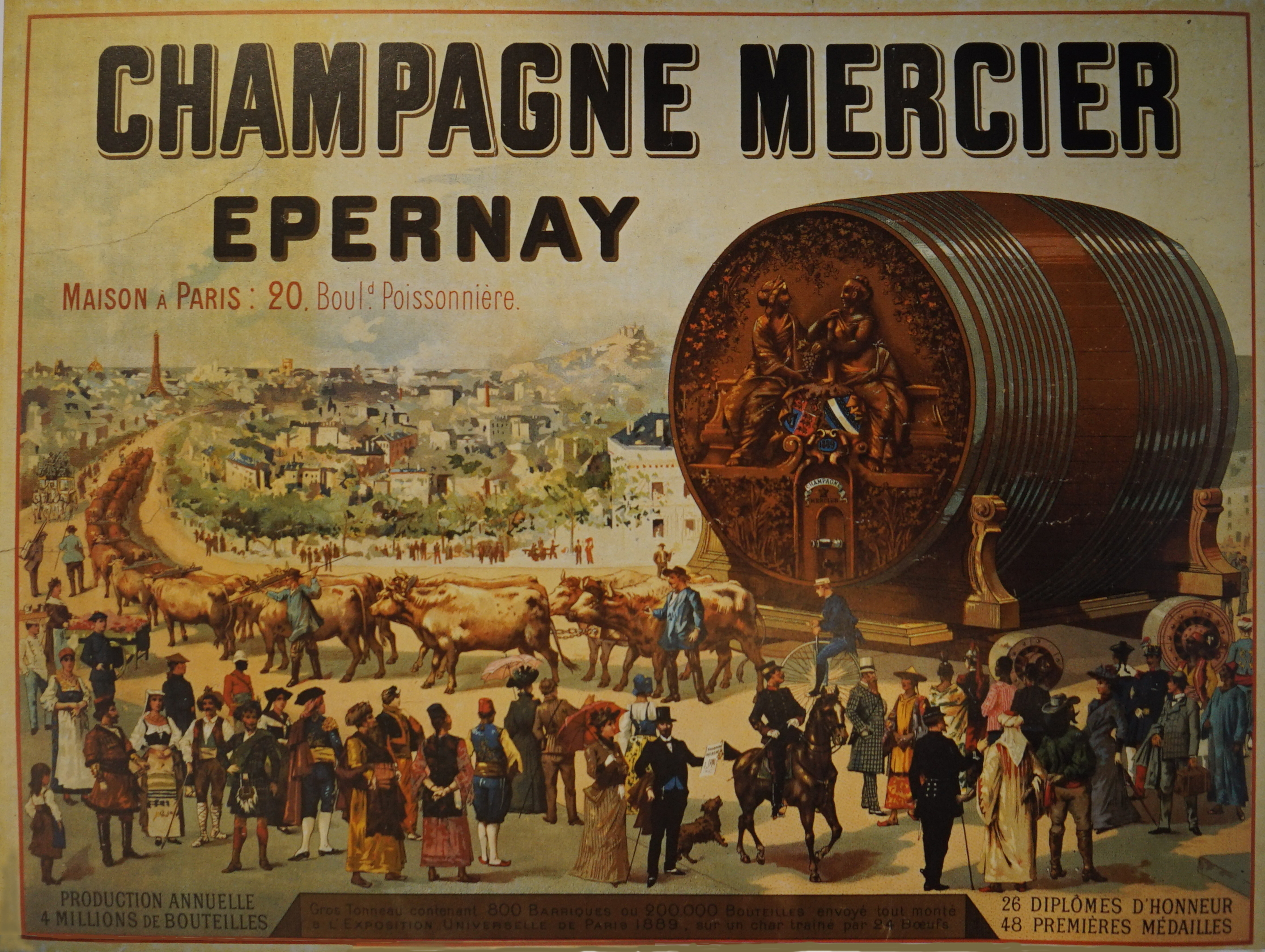 Großes Cuvéefass von Champagne Mercier, altes Werbeschild. Fassungsvermögen 200000 Flaschen, Transport zur Weltausstellung Paris 1889 mittels Ochsengespann zu 40 Ochsen.